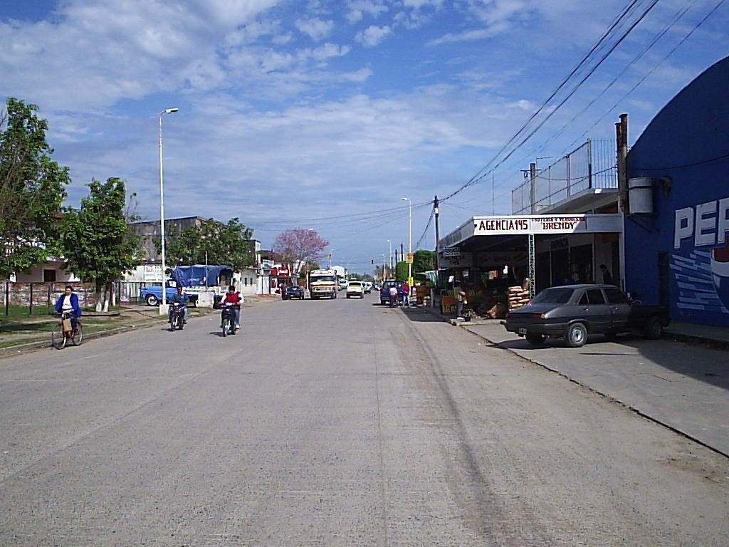 Vista de la Avenida España desde su intersección con la calle Hertelendy, Ciudad de Clorinda. View of España avenue, Clorinda.